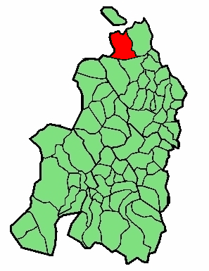 Bidaxune udalerriaren kokapena Nafarroa Beherean